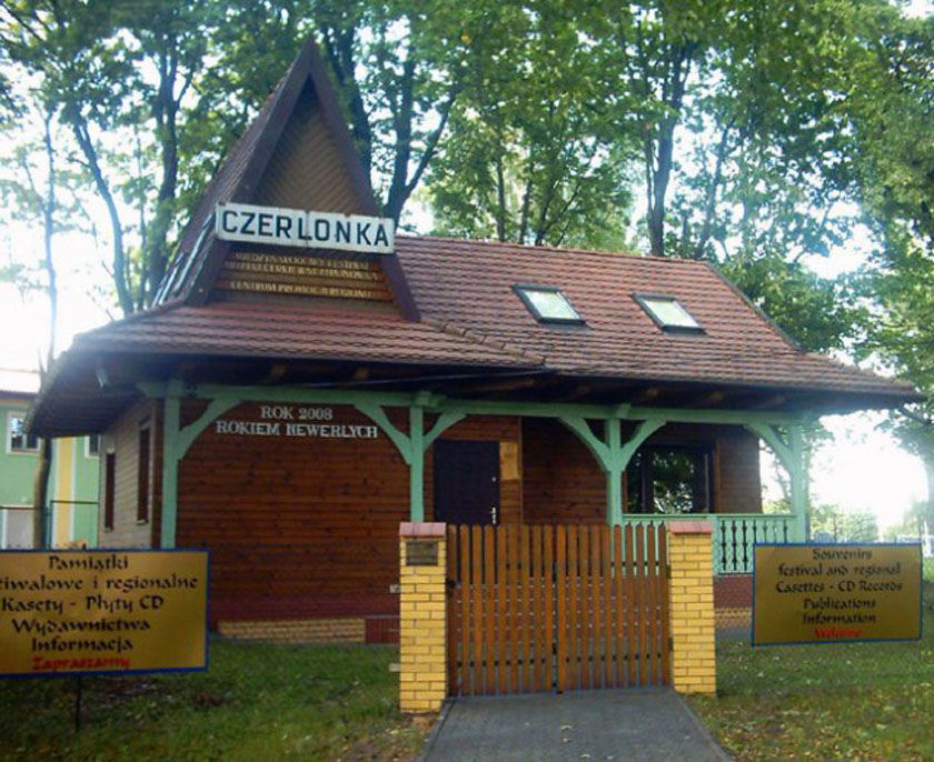 Budynek stacji kolejowej znakomity przykład miejscowej sztuki ciesielskiej pierwszej połowy XX wieku został w 1994r. przeniesiony do Hajnówki. Służy obecnie jako siedziba Centrum Promocji Regionu i Międzynarodowego Festiwalu Muzyki Cerkiewnej mieści się przy ul. Tamary Sołoniewicz.